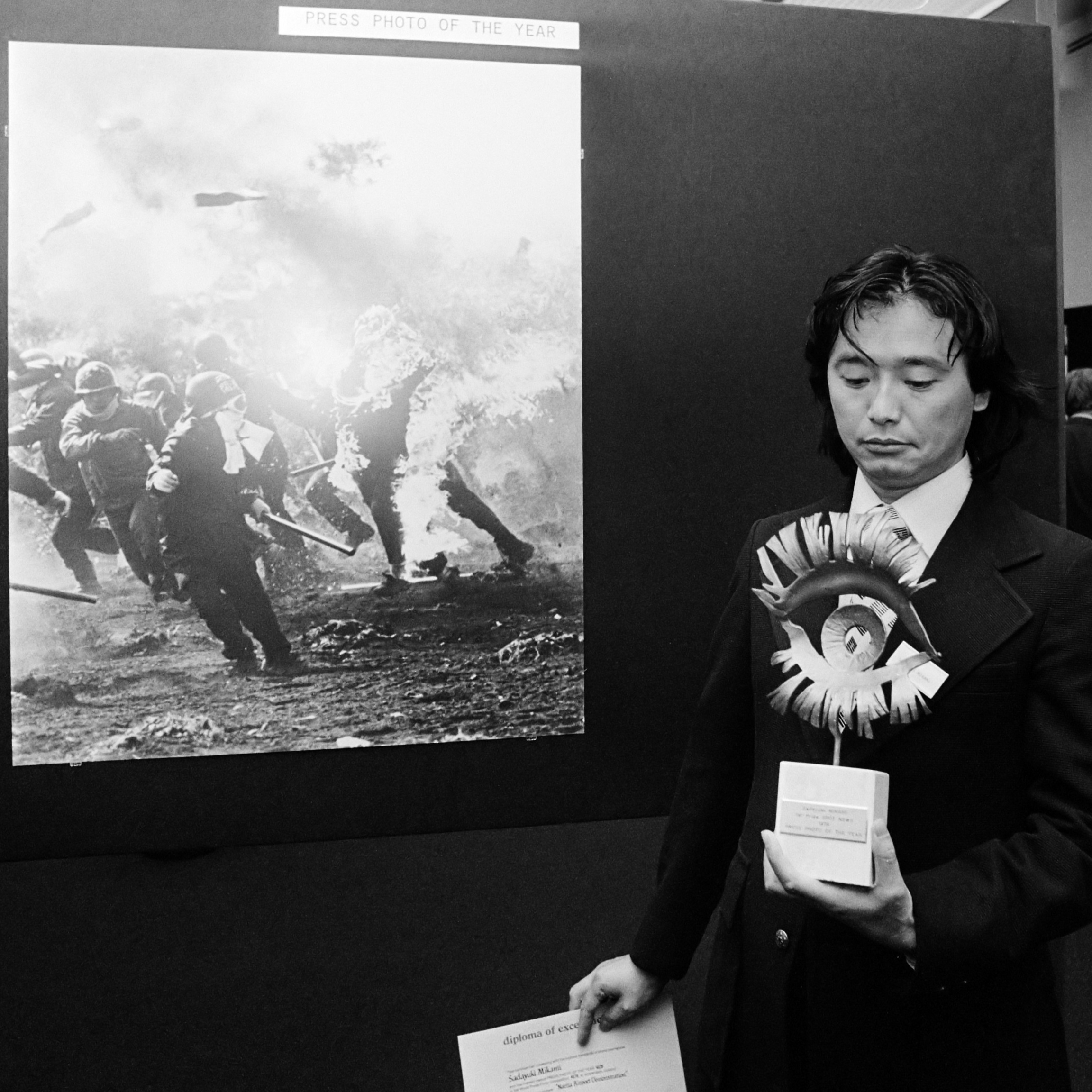 Uitreiking 1e prijs World Press Photo. Prijswinnaar Sadayuki Mikami bij de winnende foto 4 april 1979